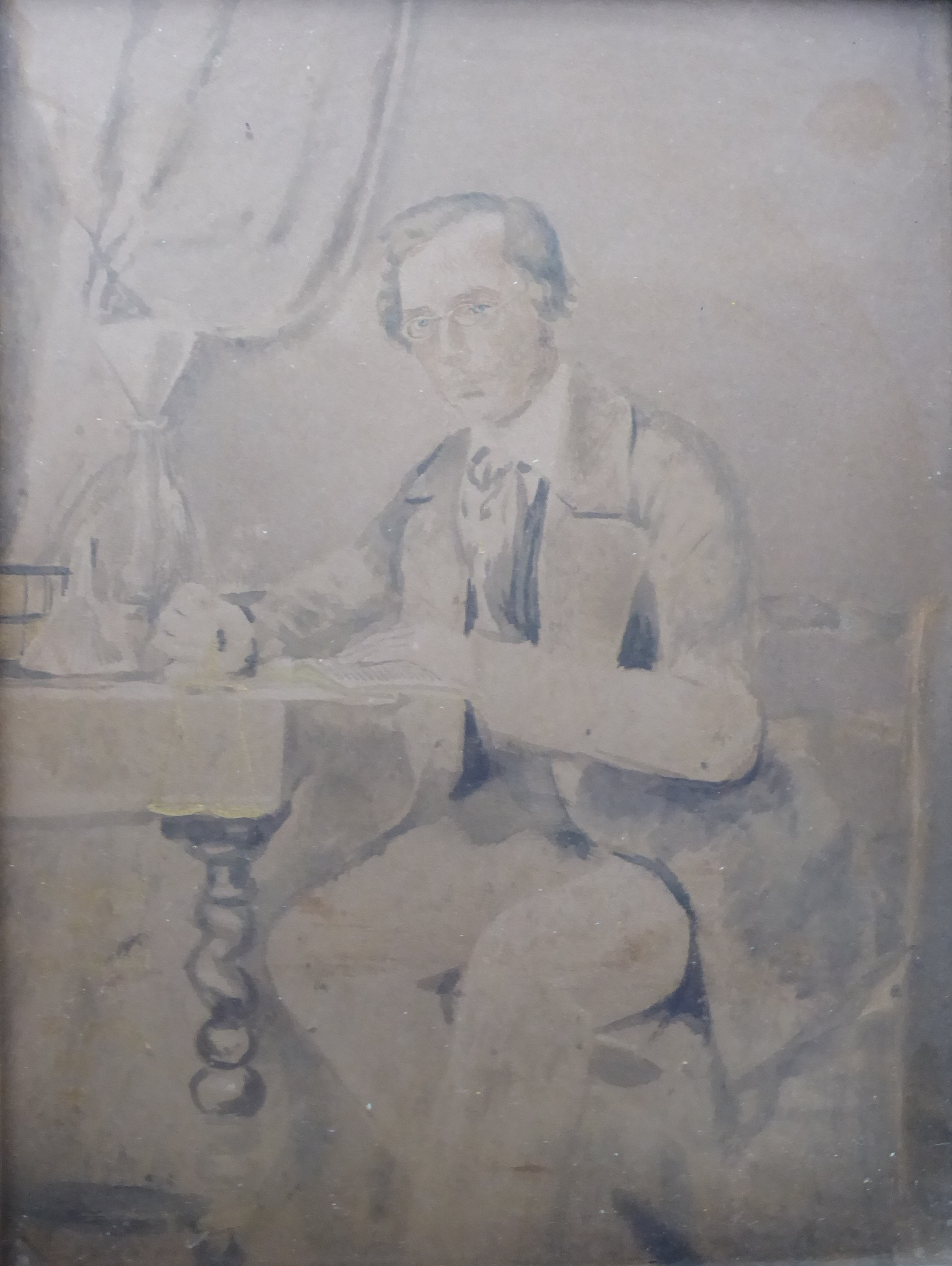 Der Apotheker Friedrich Ettling aus Kirchheimbolanden, Photographie durch "Fritz und Julie Vogel", Frankfurt/Main, 1846